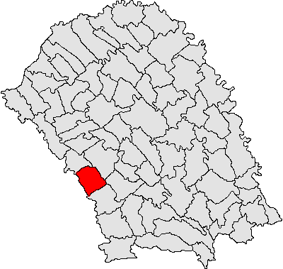 Categorie:Hărţi ale judeţului Botoşani